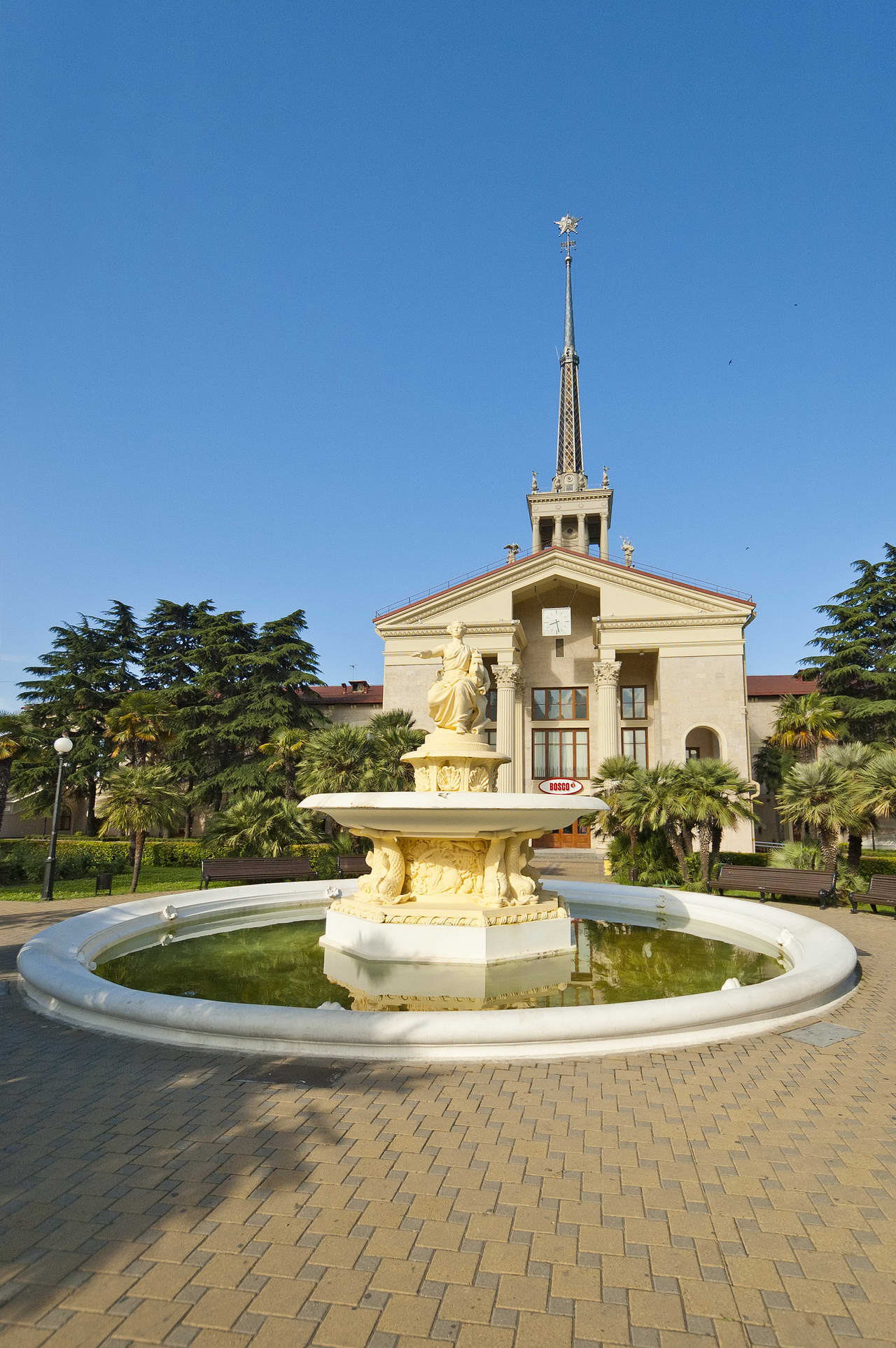 Здание морвокзала (Краснодарский край, Сочи, войкова улица, 1)